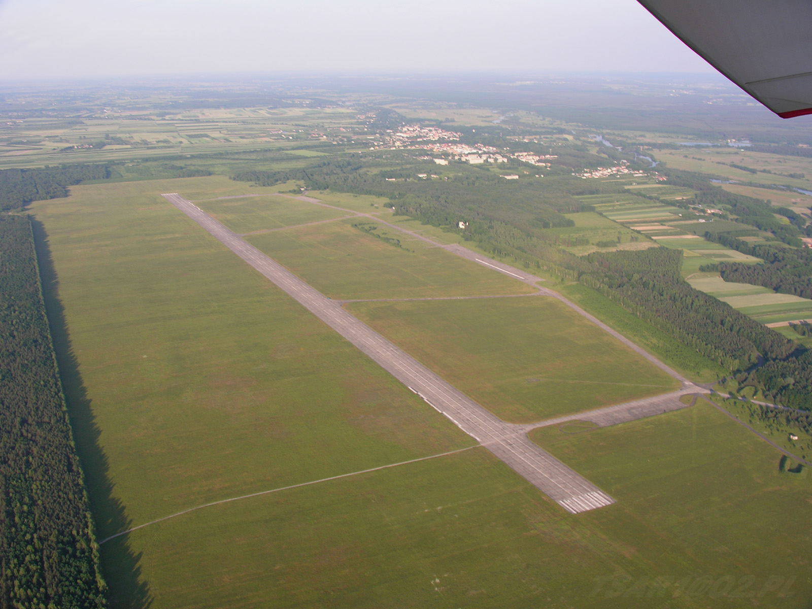 Zdjęcie lotniska wykonane dnia 07.06.2007, dzięki uprzejmości przygodnych motolotniarzy.